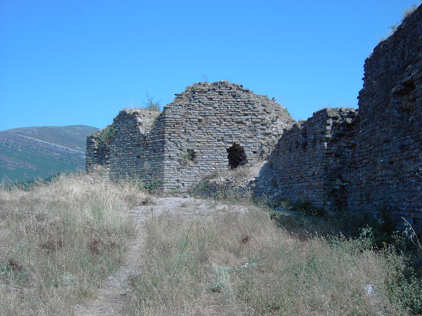 La torre del homenaje del Castillo de Boltaña, de característica planta hexagonal, construido entre los siglos VIII y XII.